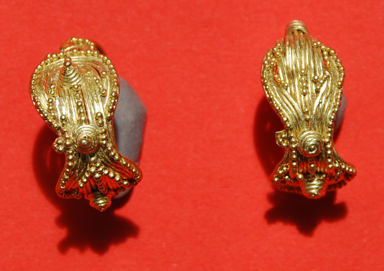 Srpski (latinica): Par naušnica sa filigranom od zlata iz perioda 2-3 vek. Pronađene su iskopavanjima u periodu 1960-1964. na lokalitetu Kamenitica u Maloj Kopašnici. Deo su antičke zbirke Narodnog muzeja u Leskovcu.